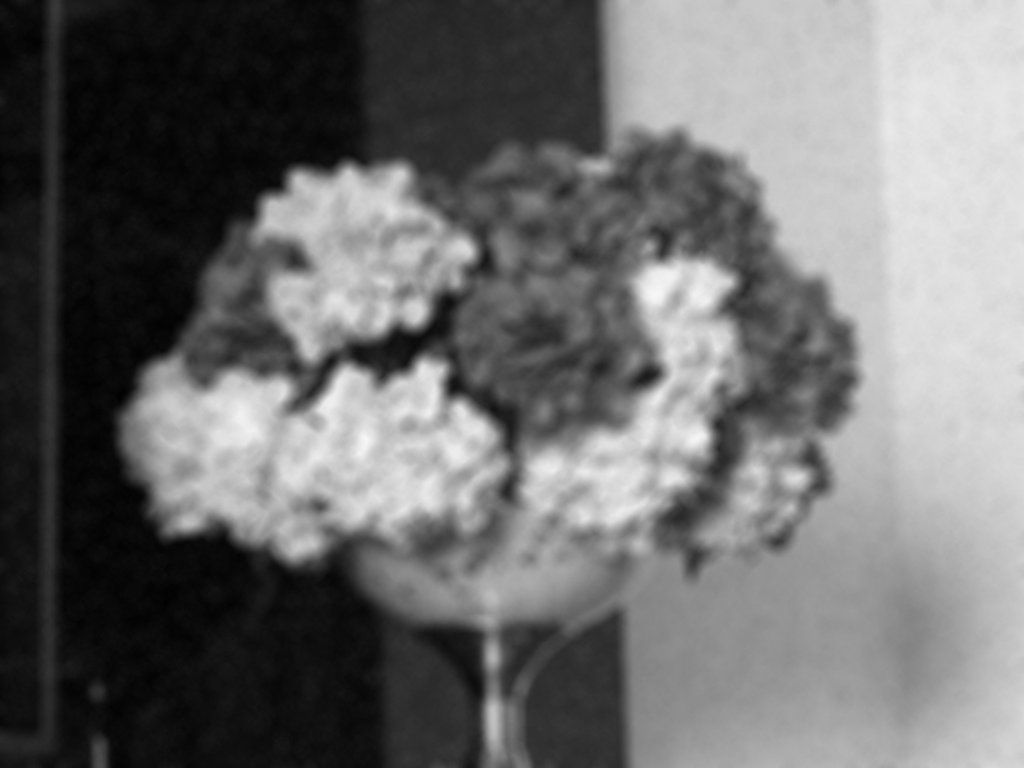 Imagem com máscara - 9px